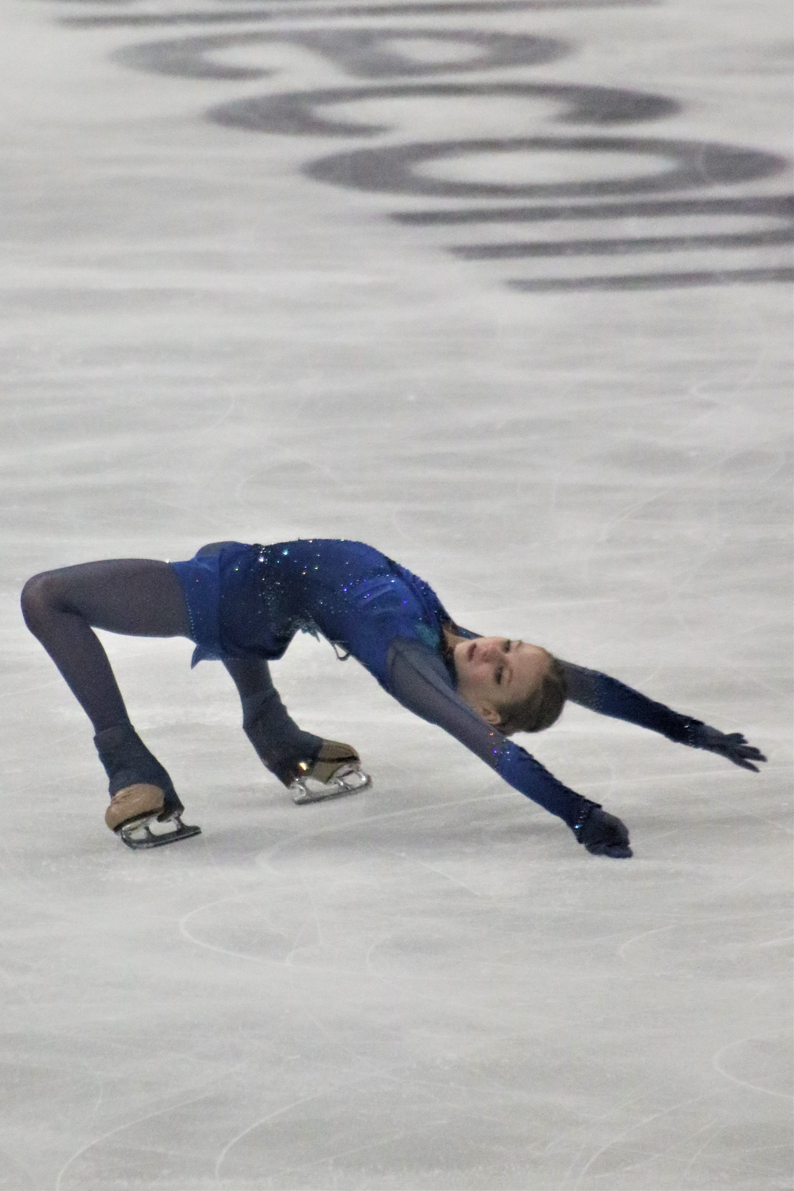 Александра Трусова (Россия) на Rostelecom Cup 2019